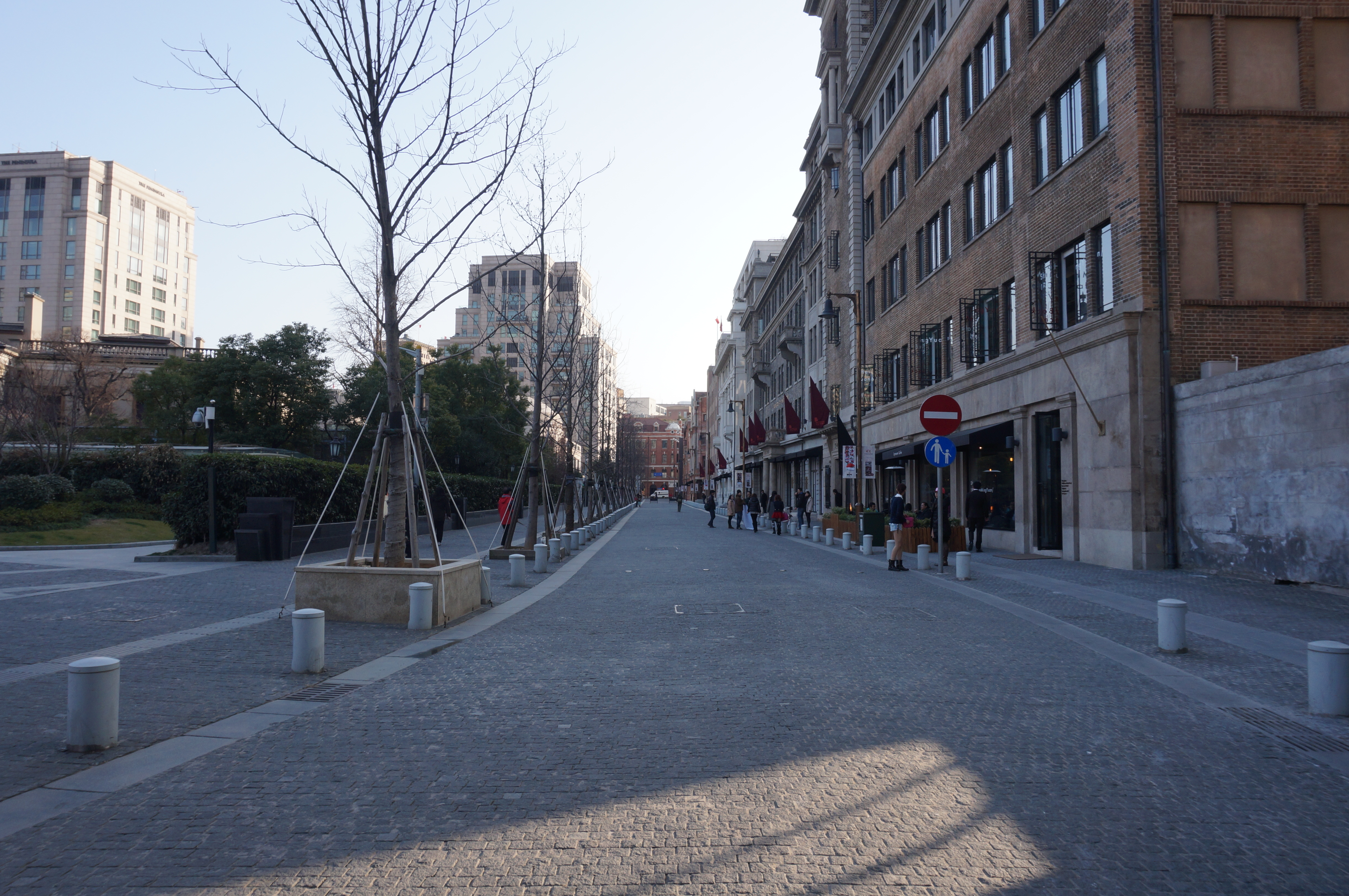 上海圆明园路街景（南望）